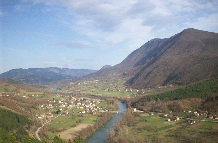 Crvena stena.